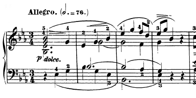 Compassos iniciais do terceiro movimento da Sonata Op. 7 de Beethoven